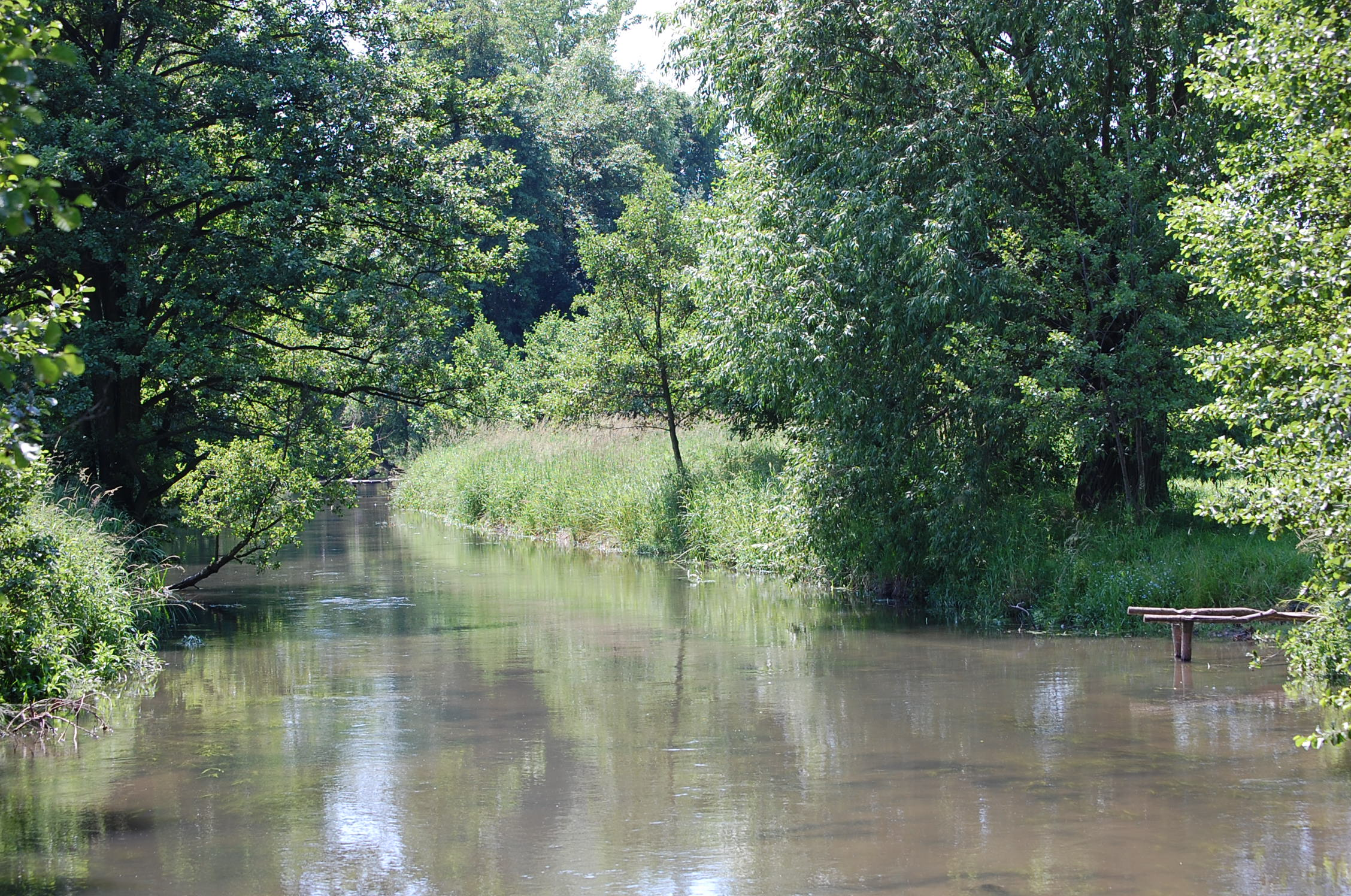 Bystrzyca przepływająca przez Osmolice